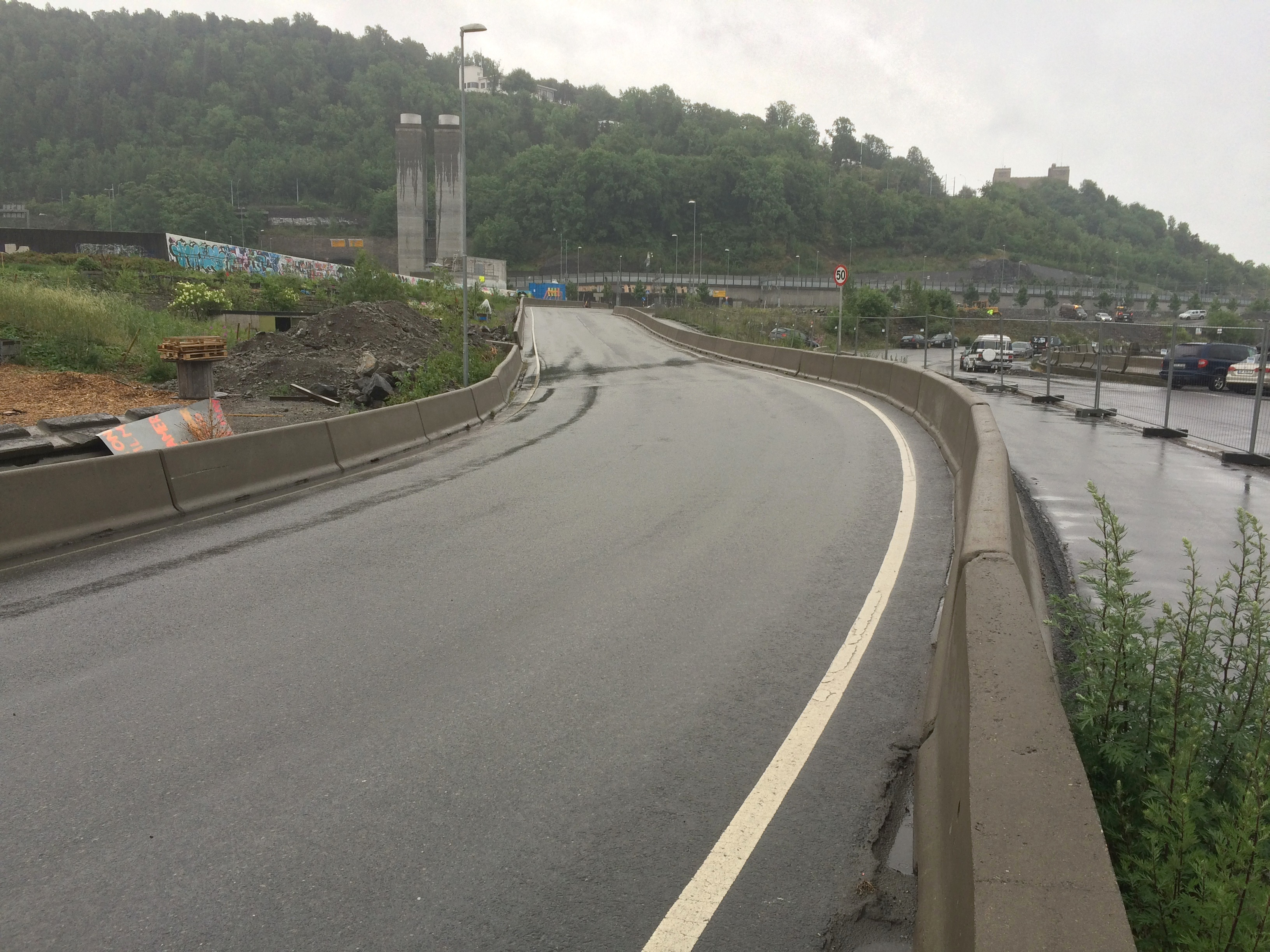 Sørover i Kongshavnveien relativt nær nordenden